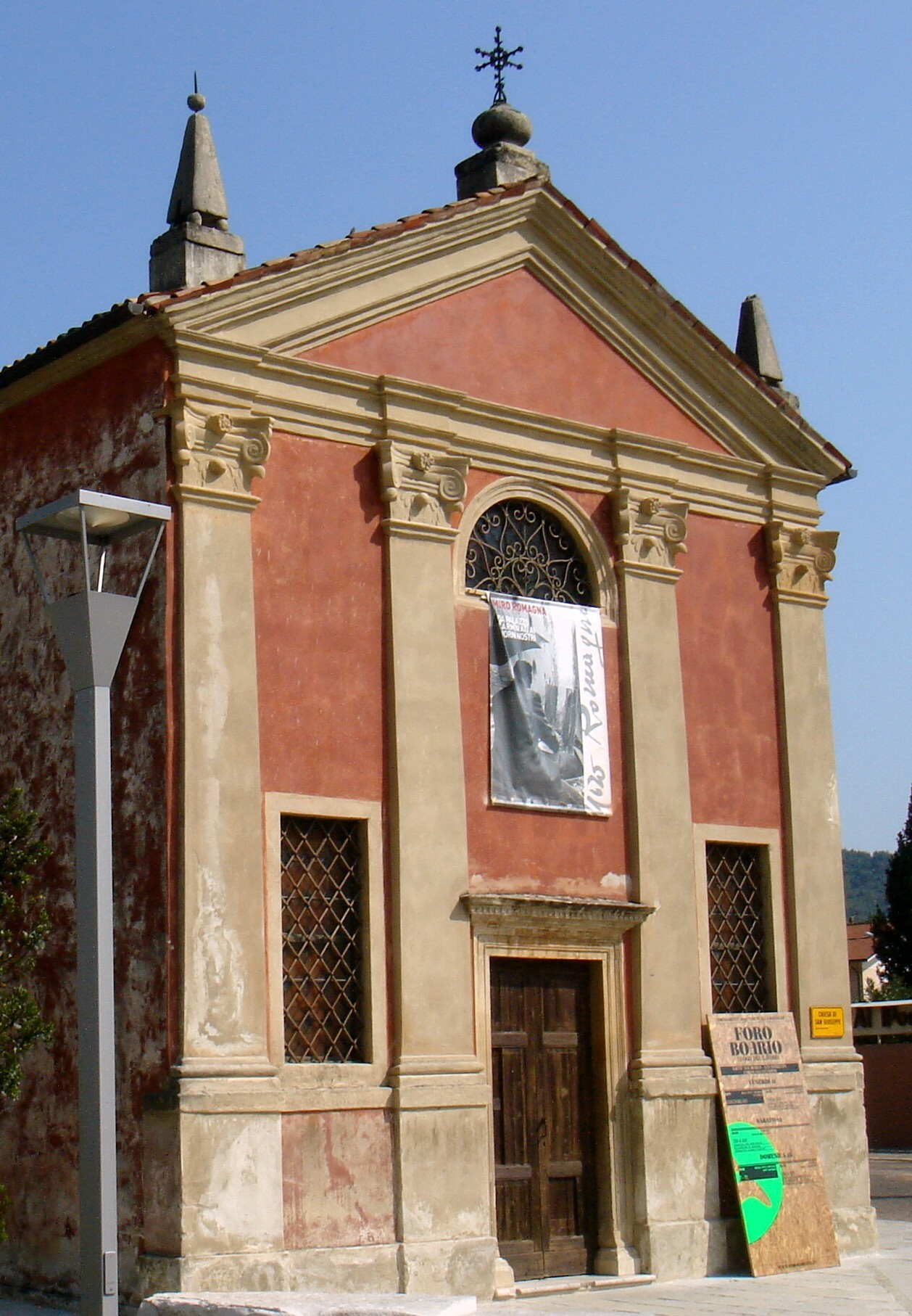 Serrevalle (TV): Oratorio di San Giuseppe presso il foro boario.